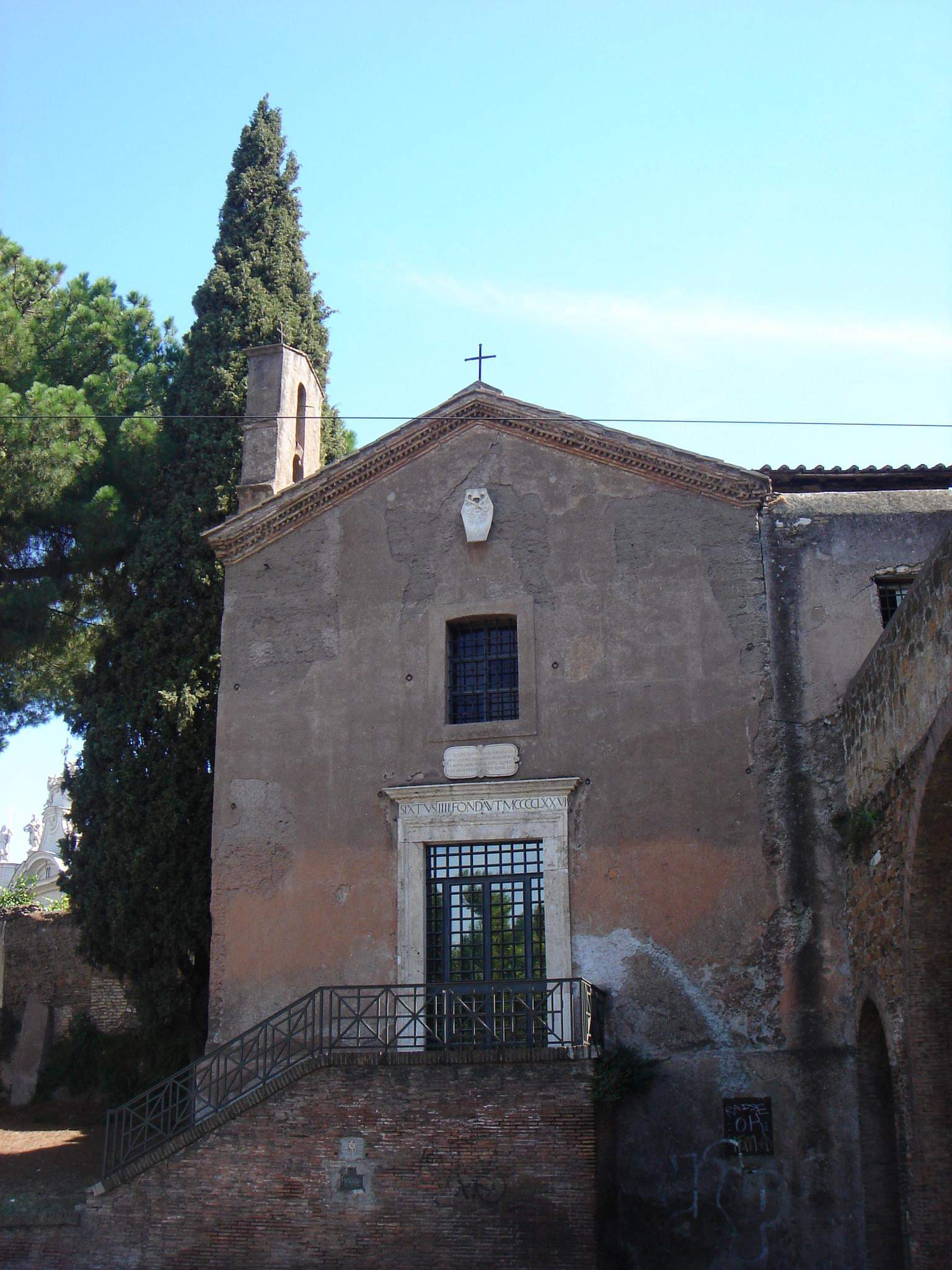 Roma, oratorio di Santa Maria del Buon Aiuto all'Anfiteatro Castrense (Santa Croce in Gerusalemme)